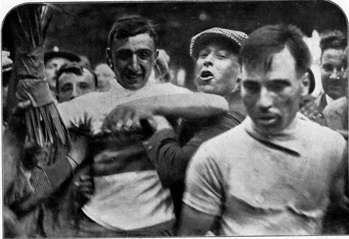 Pierino Bertolazzo il 17 agosto 1929, indossa la maglia di campione del mondo dopo aver trionfato ai Campionati del mondo di ciclismo su strada 1929 di Zurigo. Vicino a lui Gestri